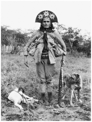 ritratto del cangaceiro Corisco